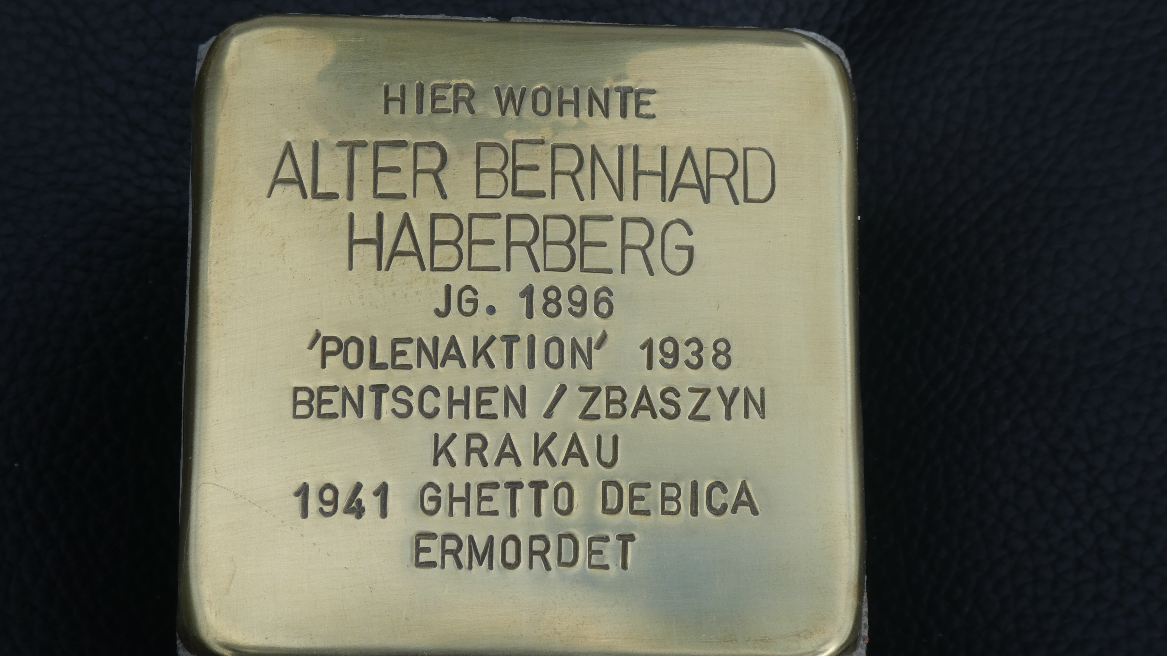 Alter B. Haberberg verlegt 2018